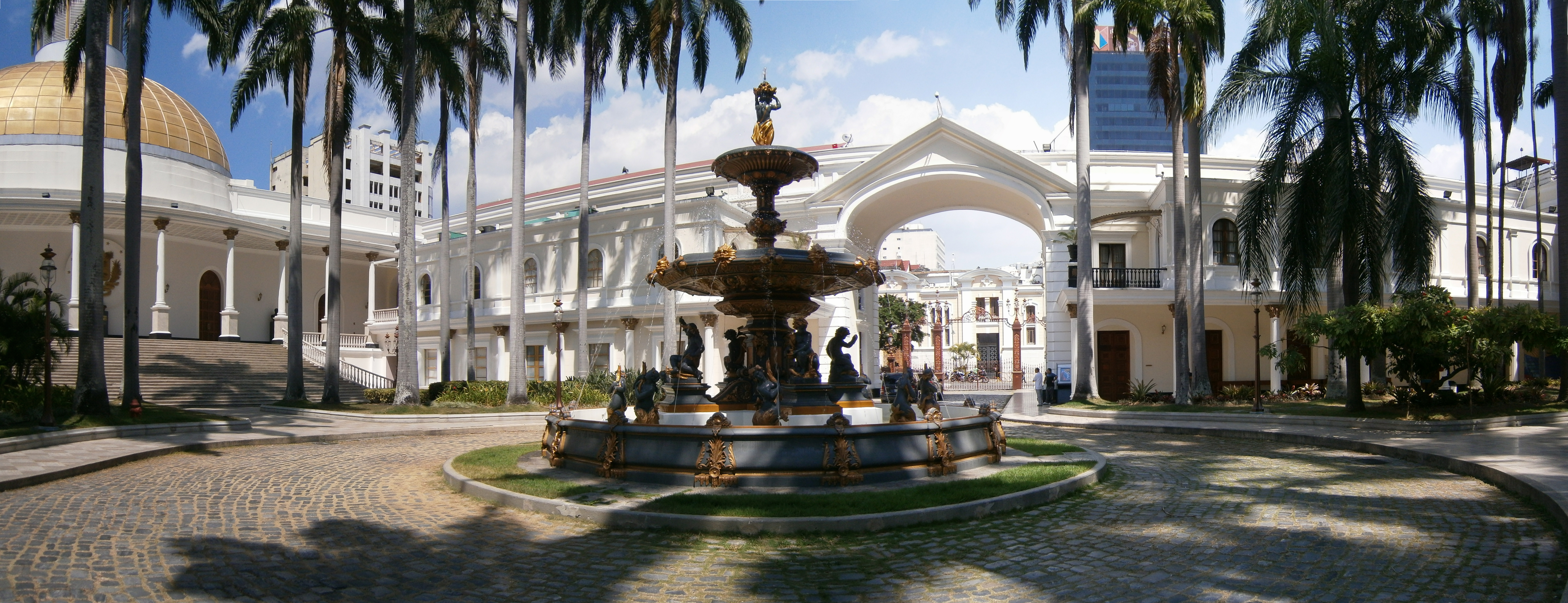 Patio central Asamblea Nacional